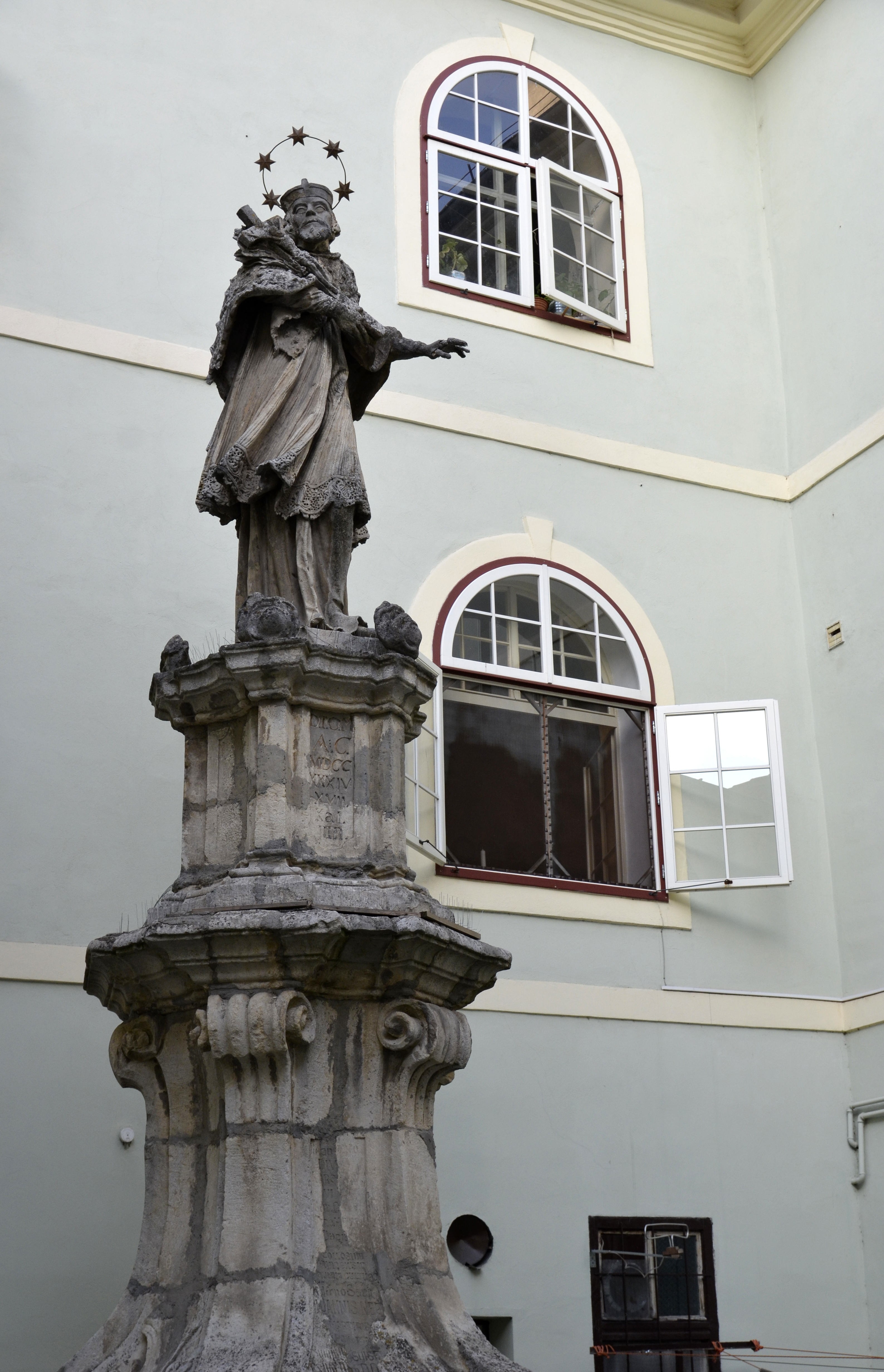 Statuia Sfântului Ioan Nepomuk la Sibiu, amplasată în curtea interioară a Bisericii Catolice din Piaţa Mare